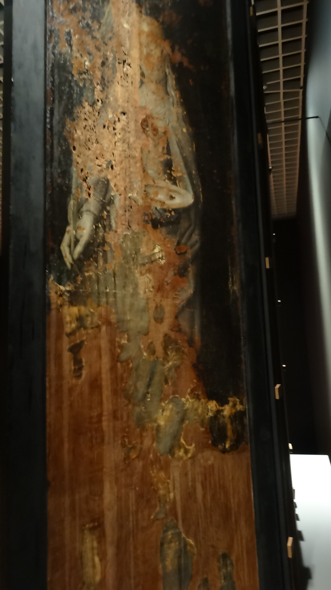 Reverso do Painel direito do Tríptico da Descida da Cruz de Gerard David e seguidores. Em grisalha, está representada S. Luzia